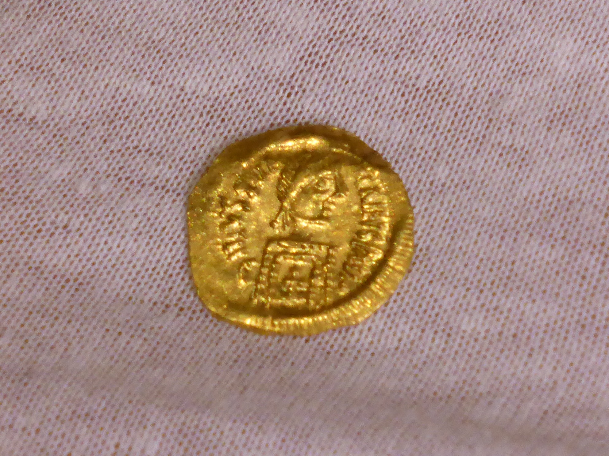 Diese Münze wurde dem "Herrn von Boilstädt" als Obolus für den Fährmann ins Jenseits in den Mund gelegt.